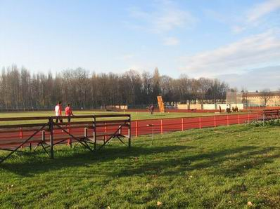 Novi atletski stadion u Sr. Mitrovici sagradjen 2007. godine